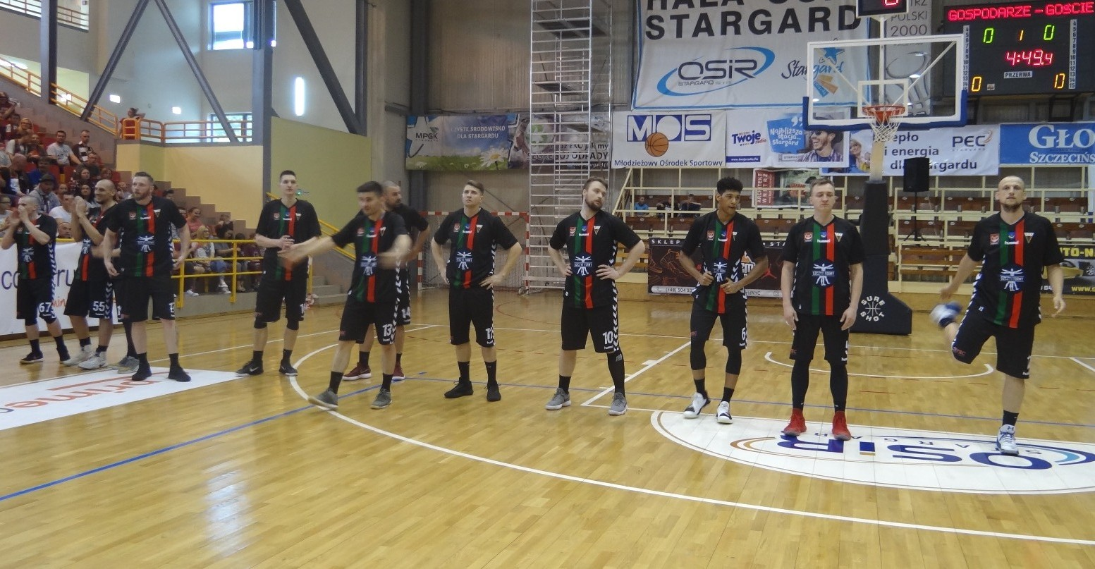 Prezentacja GKS Tychy (28.04.2018)